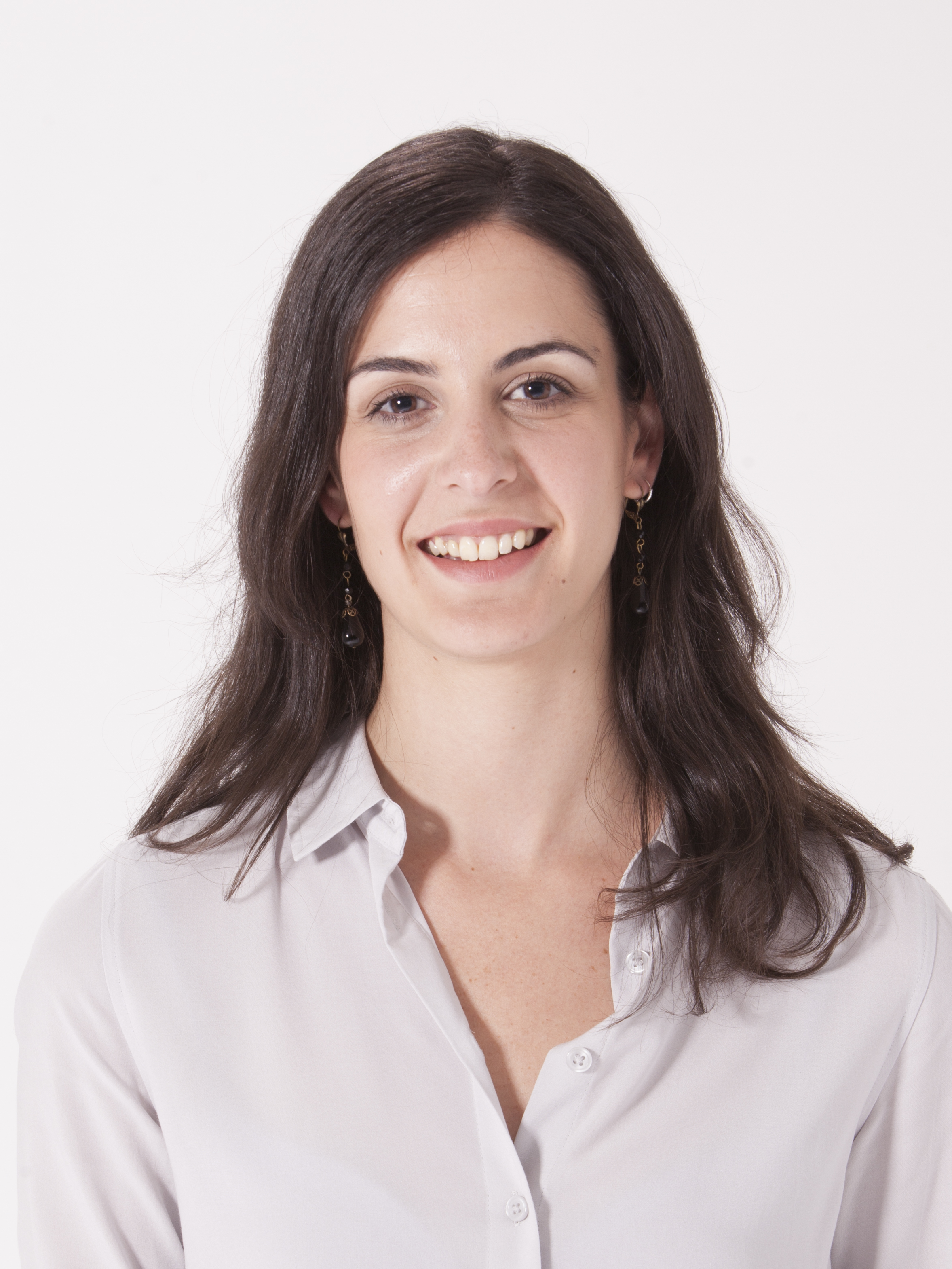 Candidatura de Ahora Madrid en las elecciones de 2015